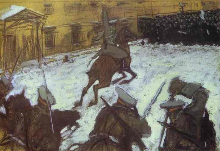 Серов В.А. «Солдатушки, бравы ребятушки, где же ваша слава?» 1905 Картон, пастель, гуашь. 47,5 х 41,5 Государственный Русский музей Работа поступила в Русский музей в 1918 году из художественного бюро Н.Е.Добычиной, Петроград; ранее – собрание М.Горького (дар автора), Петроград. Воспроизведена в журнале «Жупел» (1905, № 1). Традиционно композиция связывается с событиями 9 января 1905 г. в Петербурге. По предположению И.С.Зильберштейна и В.А.Самкова, изображен разгон демонстрации в Москве, близ Училища живописи, ваяния и зодчества в октябре 1905. Одна из самых острых сатир на царизм времени первой русской революции 1905-1907 годов создана Валентином Серовым, с начала 1890-х годов выполнявшим заказы царской семьи. Она появилась под впечатлением разгона войсками мирной демонстрации. В знак протеста Серов отказался от почетного звания действительного члена Академии Художеств, президентом которой был великий князь Владимир, командовавший войсками столичного гарнизона. Саркастически звучит уже само название работы – строка из русской солдатской песни. Композиция была подарена Максиму Горькому, входившему, как и Серов, в редакцию журнала «Жупел».